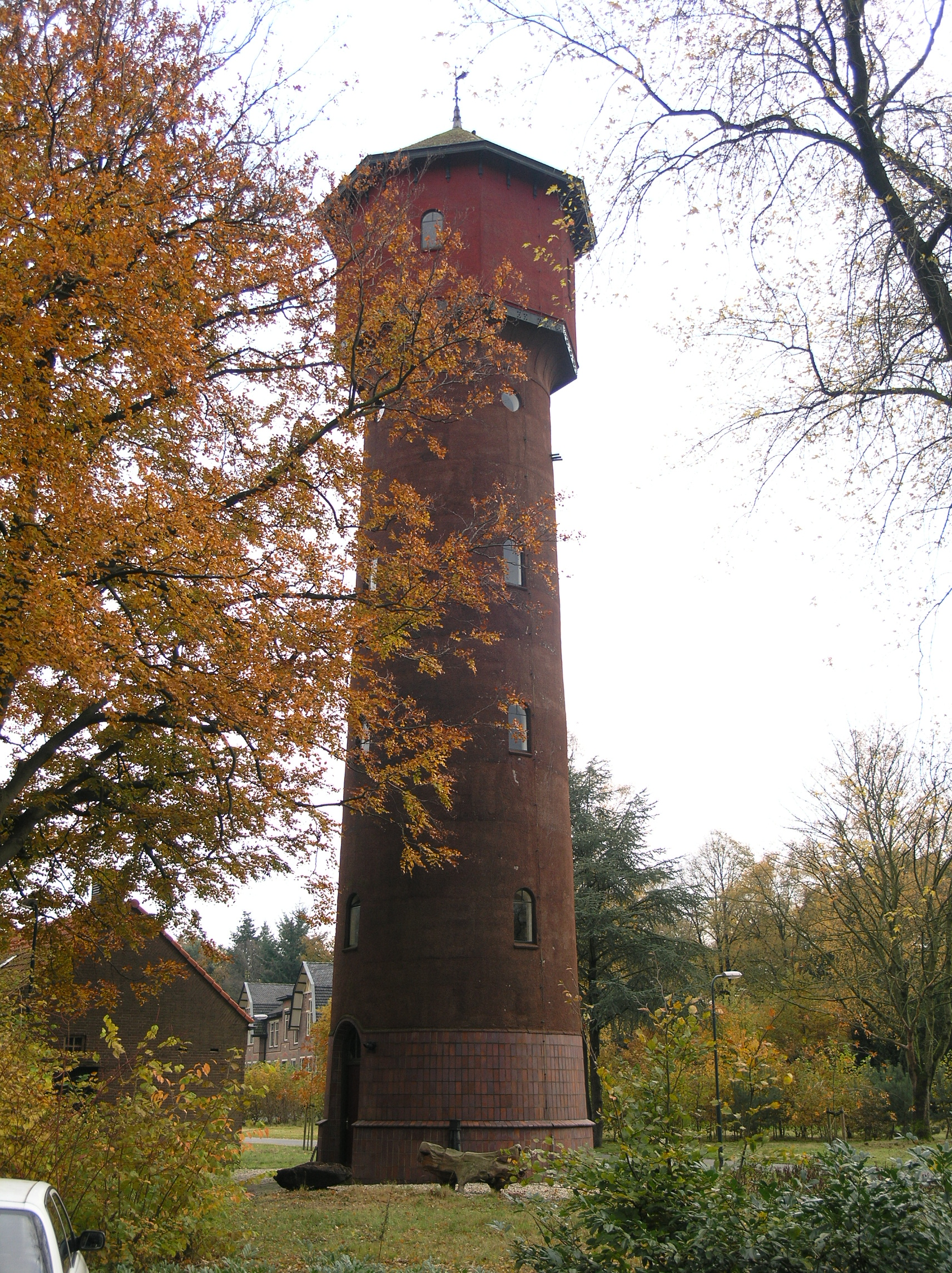 Wolfheze Watertoren 2006